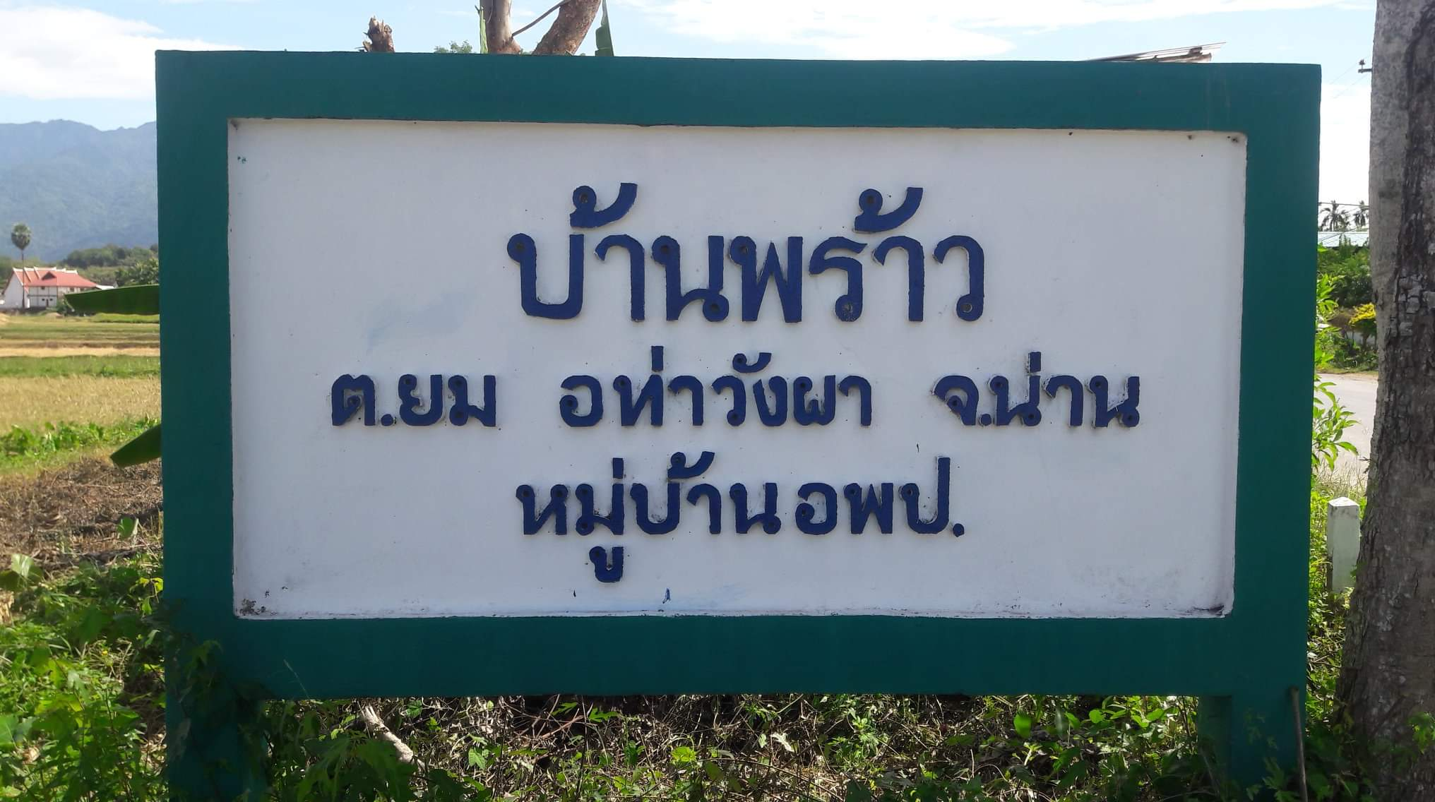 บ้านพร้าว